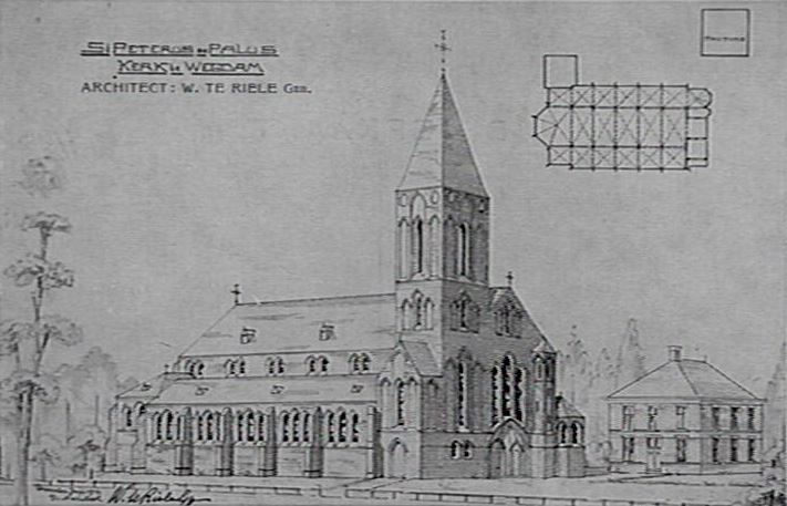 Tekening Wolter A.M. te Riele (1867-1937), kerk te Wegdam (Hengevelde). Kerk gebouwd 1912-1913, verwoest bij bombardement 1943.